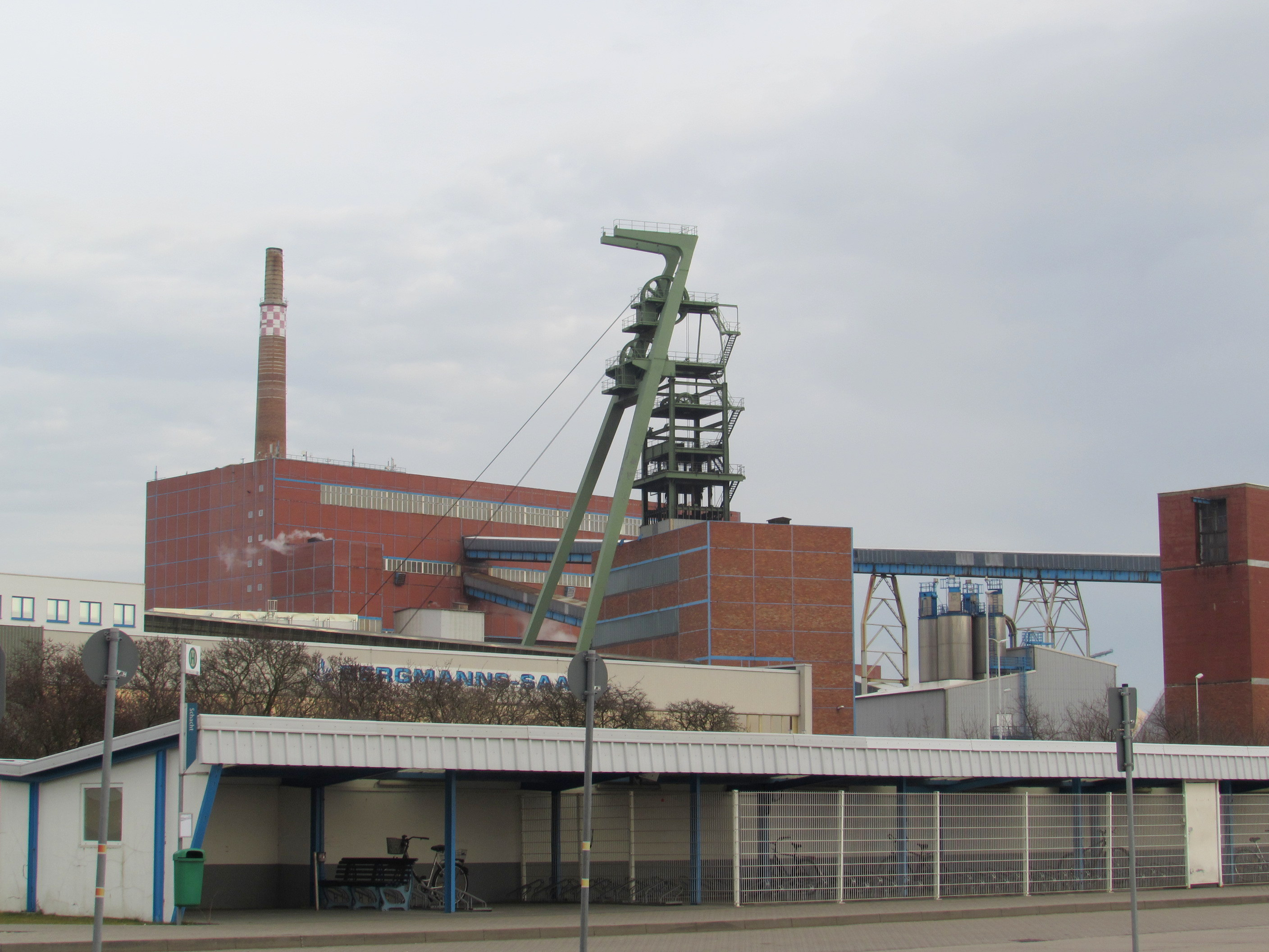 Förderturm des Kaliwerks Zielitz